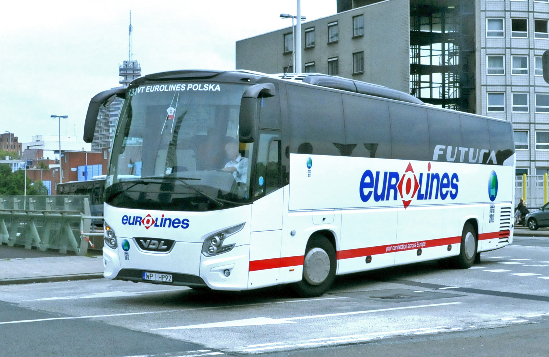 Eurolines bus van het type VDL Futura FHD2-129 te Den Haag.